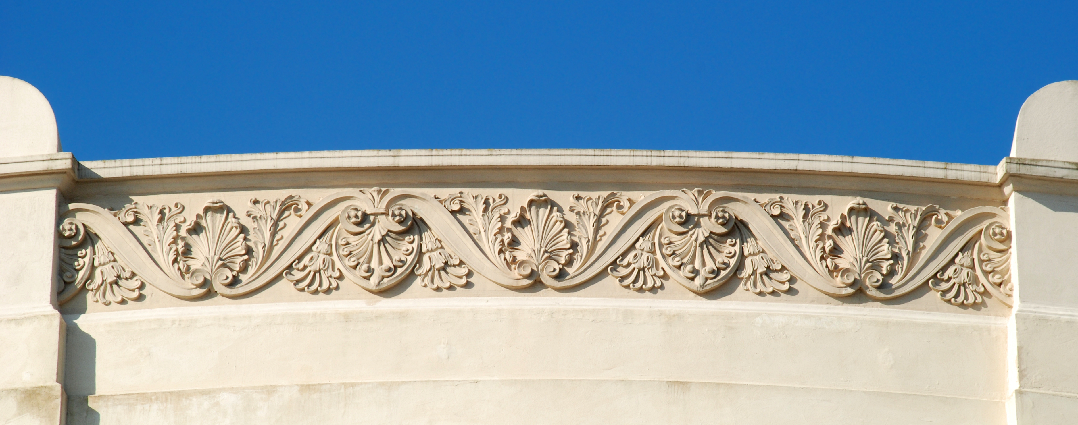 Belgique - Brabant wallon - Braine-l'Alleud - Panorama de la Bataille de Waterloo